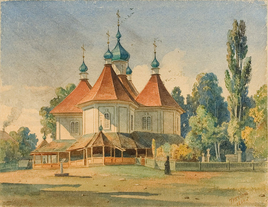 Беларуская (тарашкевіца): Царква Сьвятой Тройцы Маркава манастыра ў Віцебску